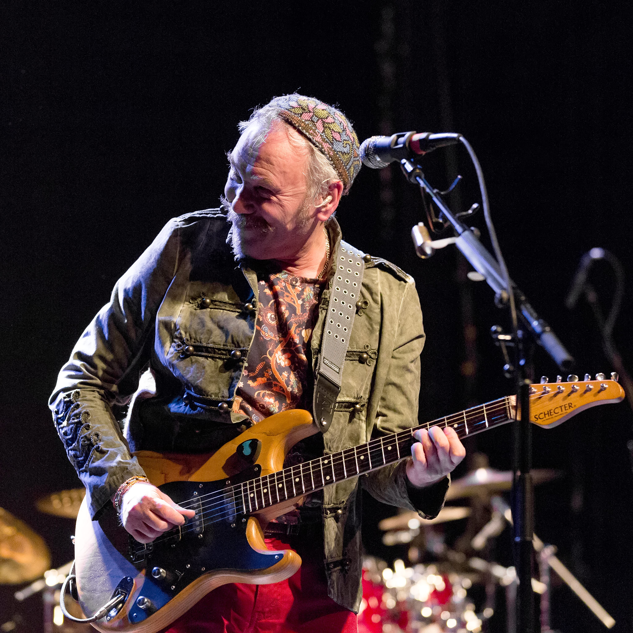 Бегунов Владимир Сергеевич. Гитарист, основатель и бессменный участник группы «Чайф». Фото с концерта в Торонто (02.11.2017)